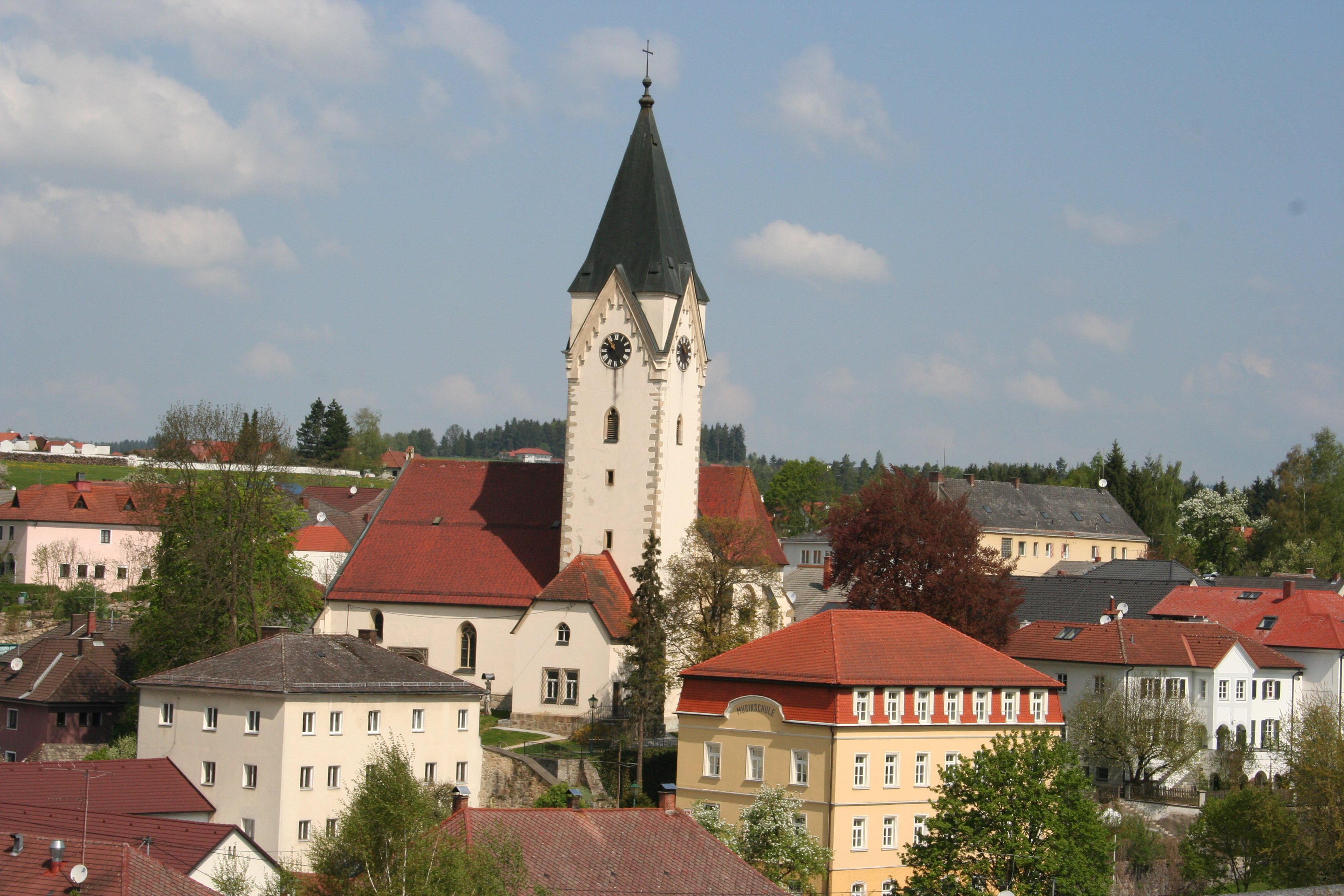 Pfarrkirche Bad Zell, außen